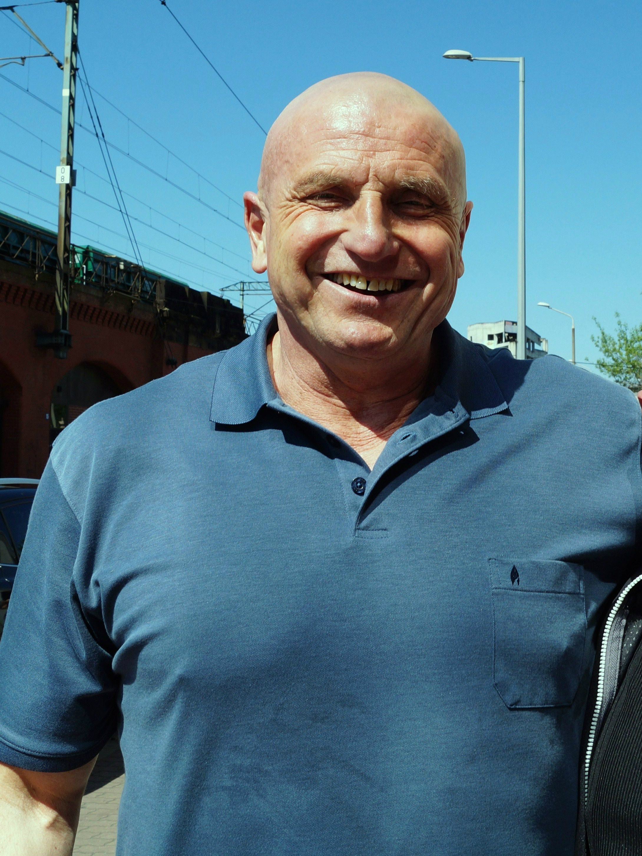 Dariusz Juzyszyn, dyskobol i aktor.